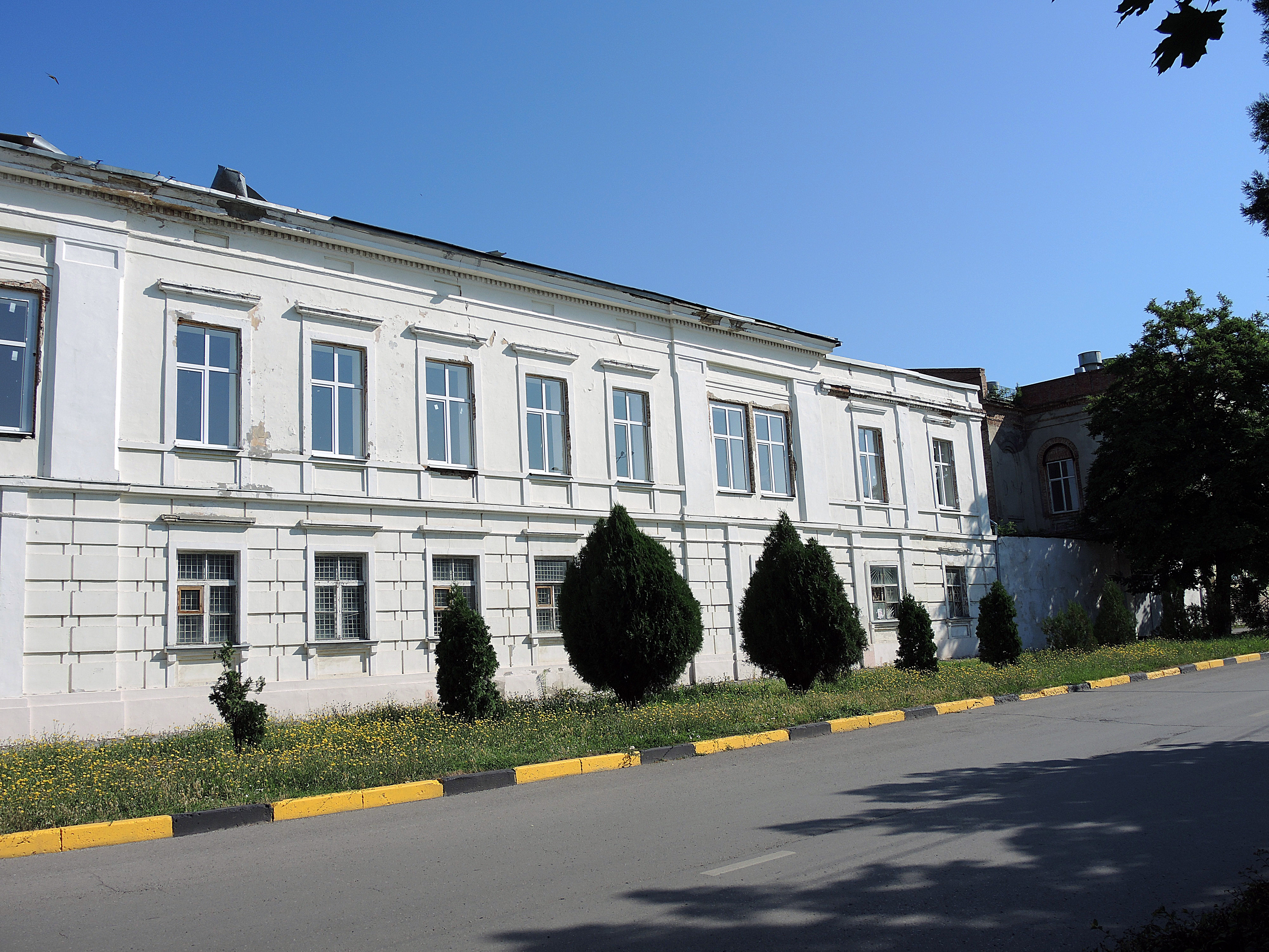 Гимназия мужская: проспект Ермака, 92, Новочеркасск, Ростовская область